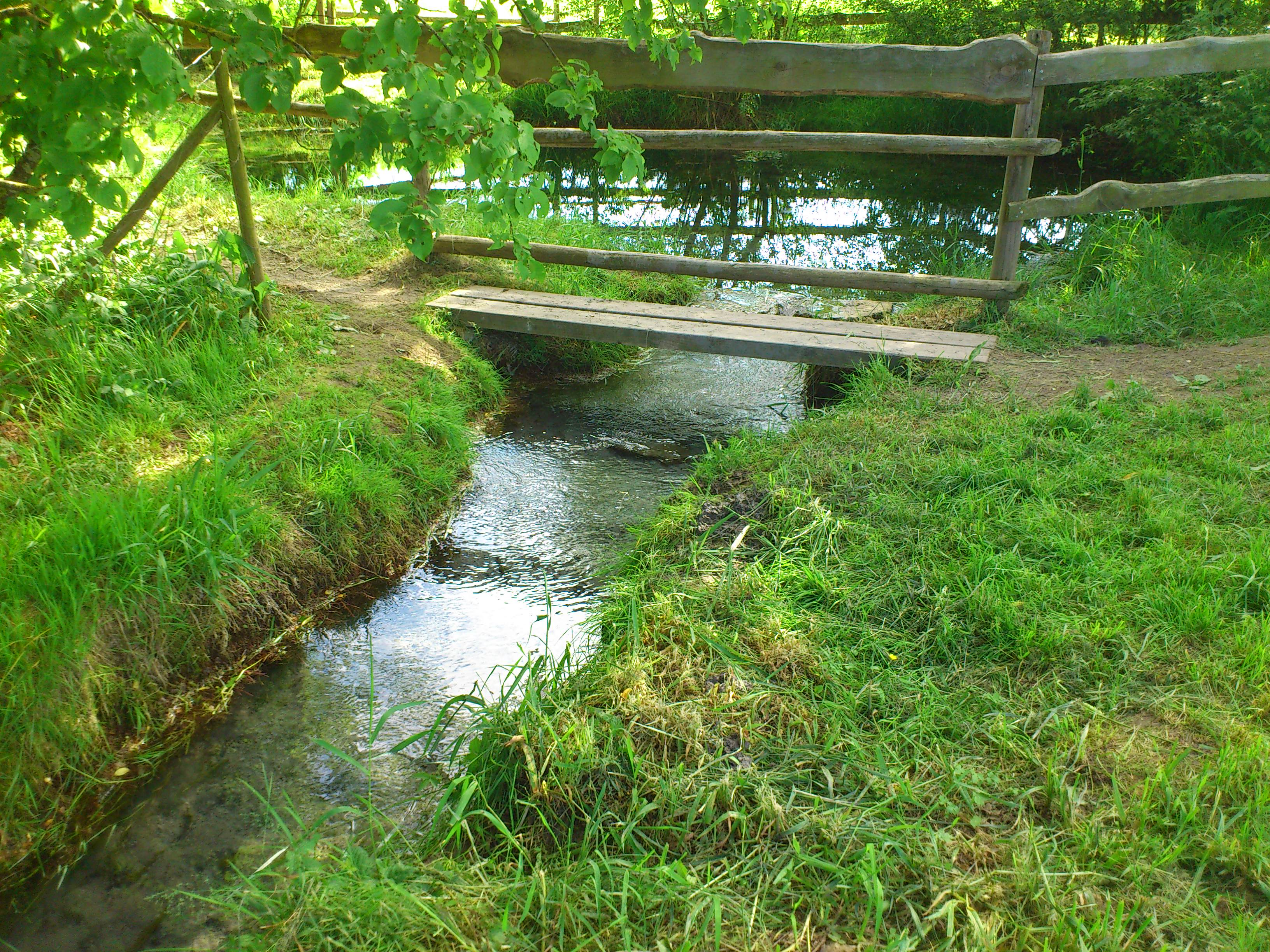 Der abfließende Bach aus dem Gründischen Brunnen